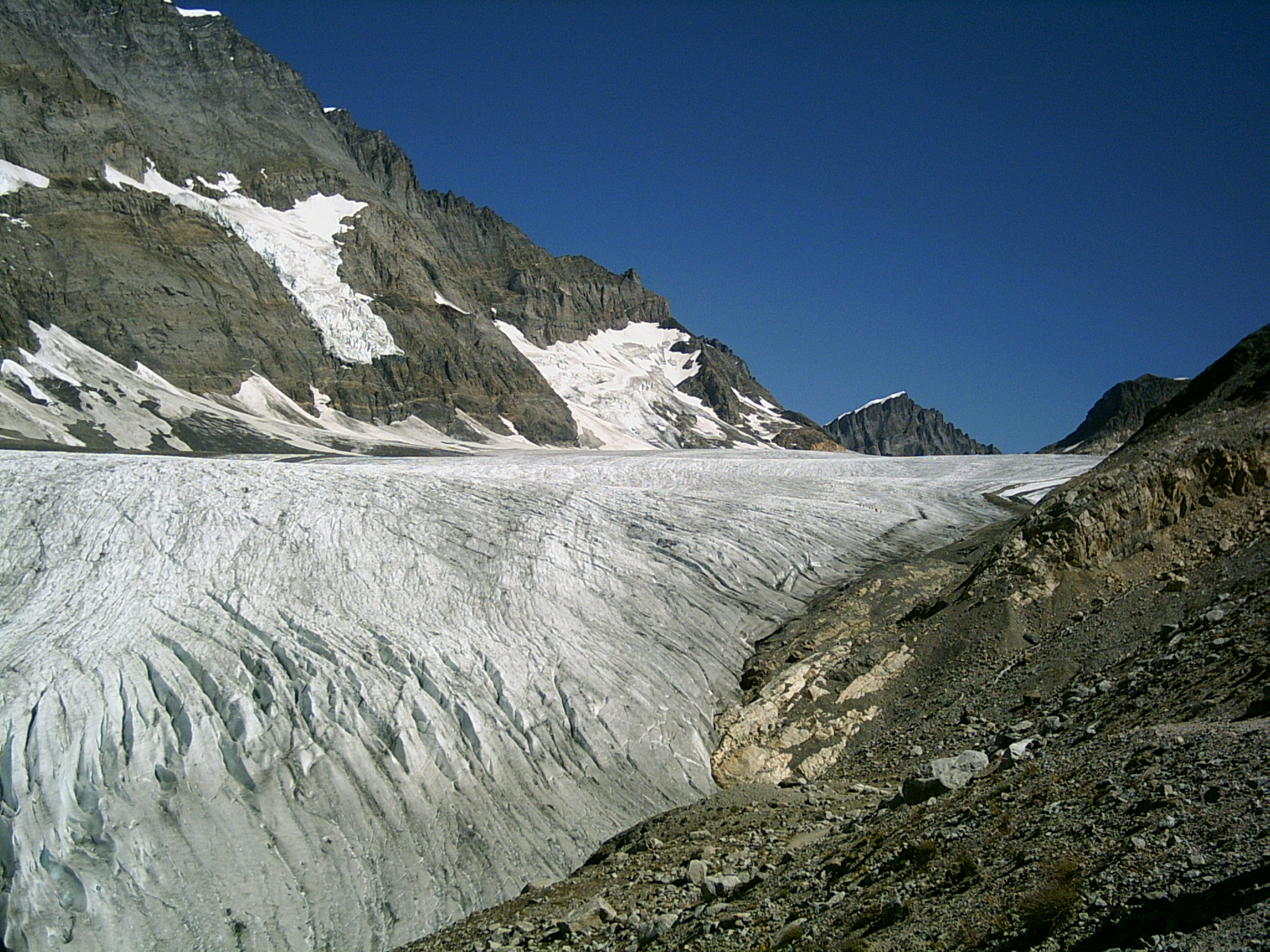 Kanderfirn, Berner Oberland Schweiz